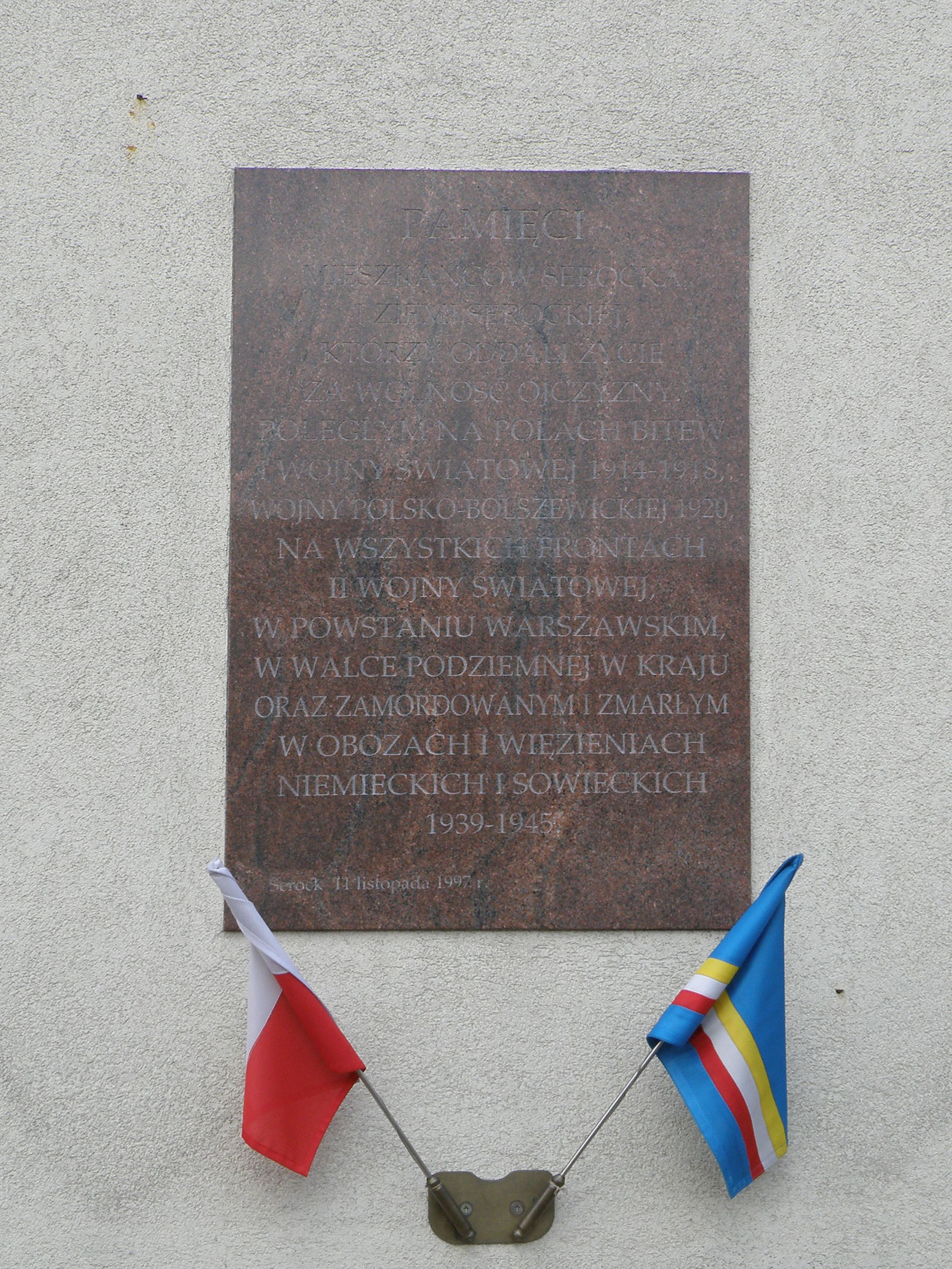 Serock (woj. mazowieckie, powiat legionowski) - pamiątkowa tablica na Urzędzie Miasta i Gminy